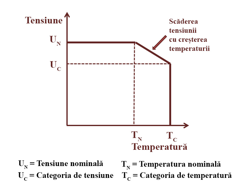 Variatia tensiunii cu temperatura